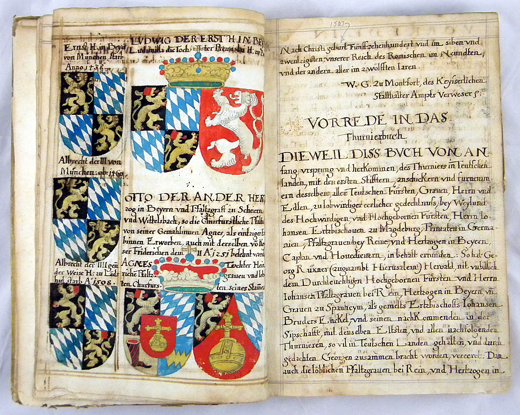 Abschrift des Rüxnerschen Turnierbuchs mit Hunderten, teils liebevoll kolorierten, Wappendarstellungen. "Anfang, Ursprung und Herkommen des Thurniers in Teutscher Nation..." von Georg Rüxner, eine deutsche Handschrift auf Papier, folgend der Frankfurter Ausgabe von Sigmund Feyerabend von 1578 oder 1579 und ergänzt mit vielen weiteren Wappenillustrationen, Deutschland, Mitte des 17. Jahrhunderts.